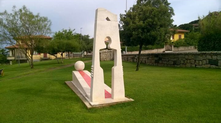 Monumento del parco La Vignaredda di Calangianus.